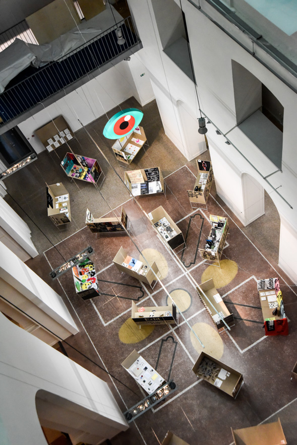 Interiér Uměleckoprůmyslového muzea